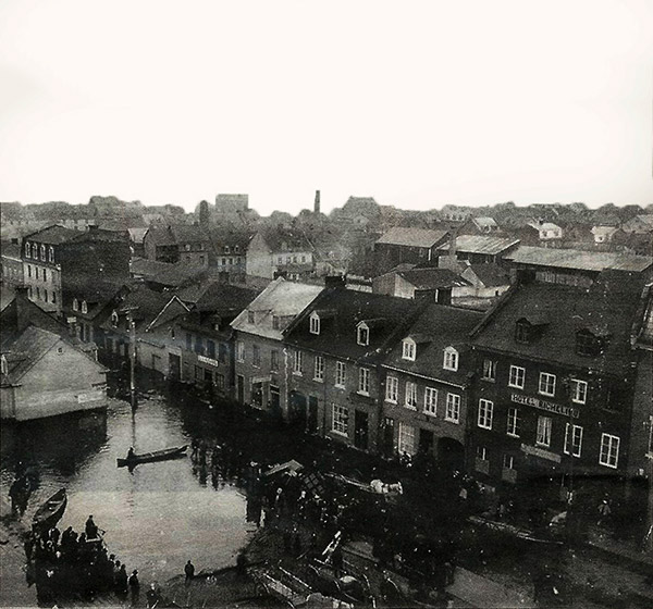 Inondation du centre-ville de Trois-Rivières en 1896.